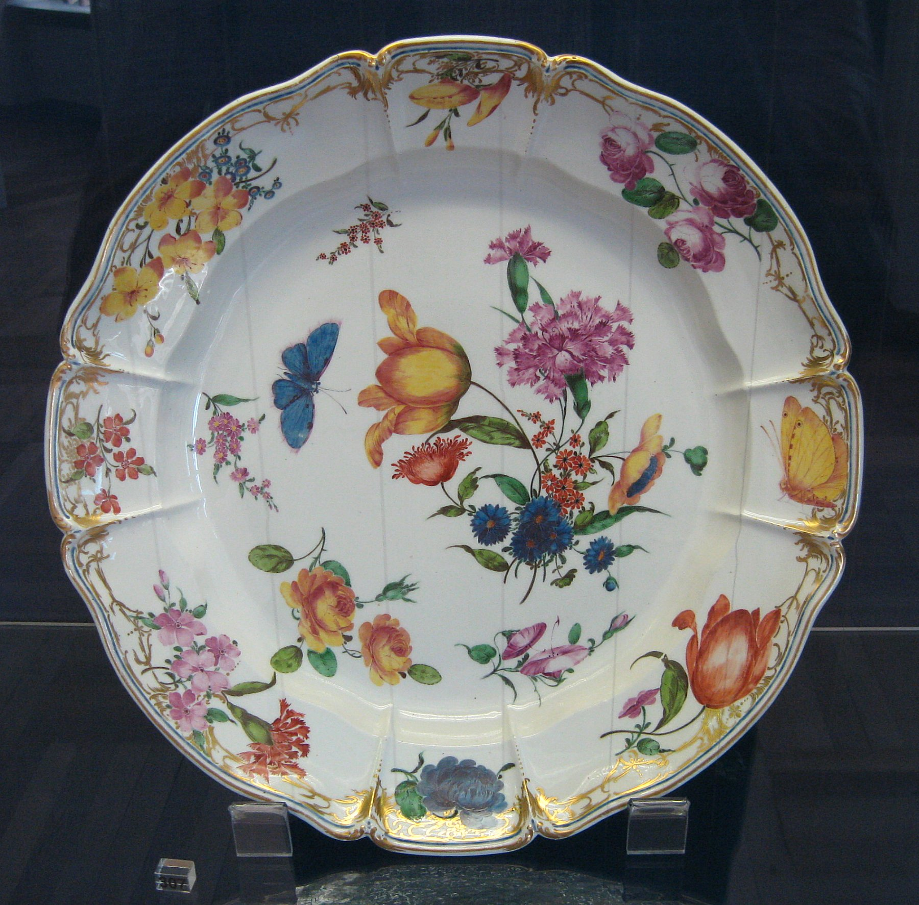 Teller aus dem kurfürstlichen Hofservice, Bemalung Joseph, Zaechenberger, 1760-65, Porzellanmanufaktur Nymphenburg, Porzellanmuseum München